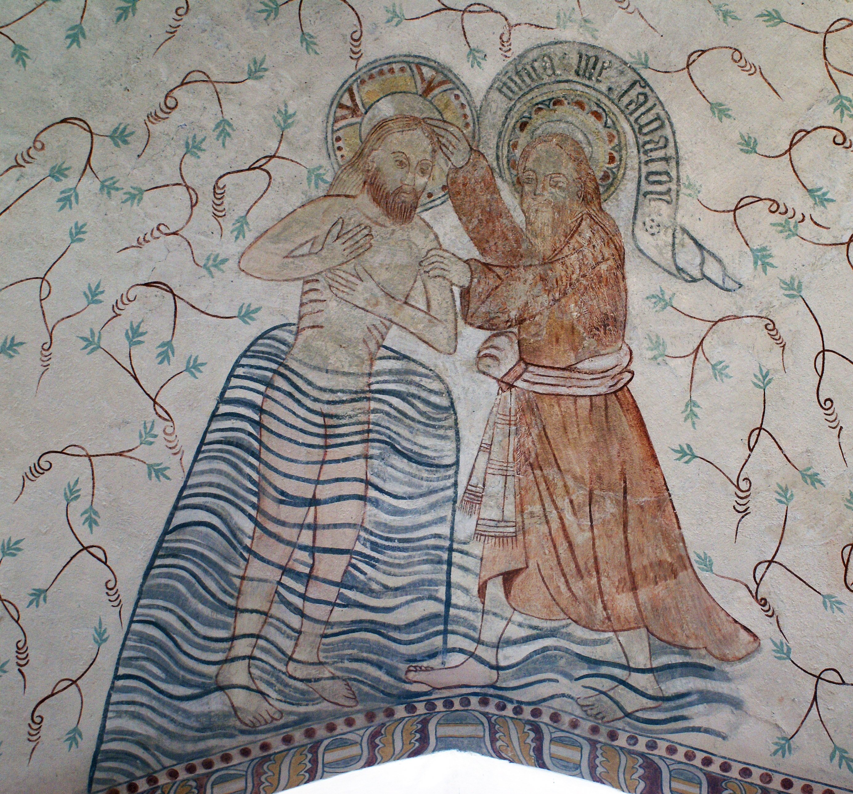 Kalkmaleri i Ballerup Kirke, Korsfæstelsen, Maria og Johannes ved korsets fod